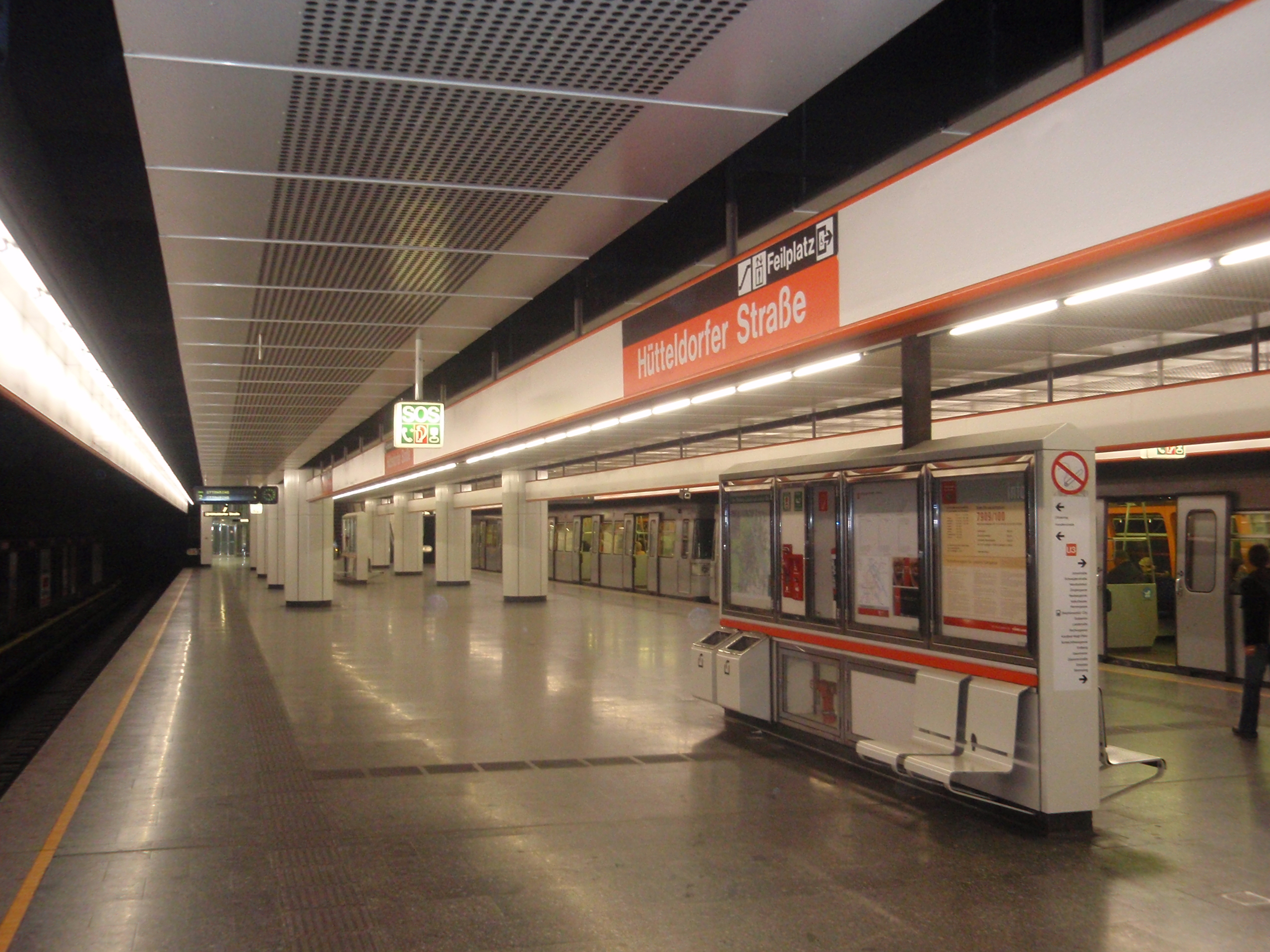 U3-Station Hütteldorfer Straße